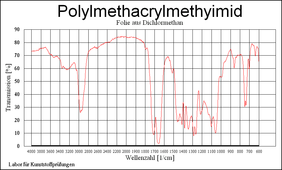 Infrarotspektrum von Polymethacrylmethylimid